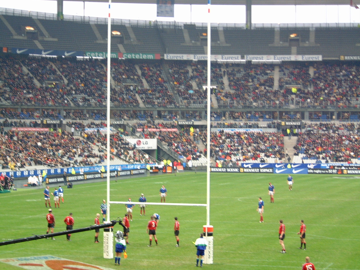 France-Canada Test match au Stade de France 22-11-2002